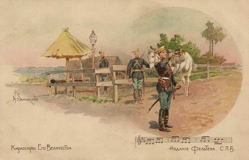 N. Samokiche. Кирассиры Его Величества. Издание Фельтена. С.П.Б.